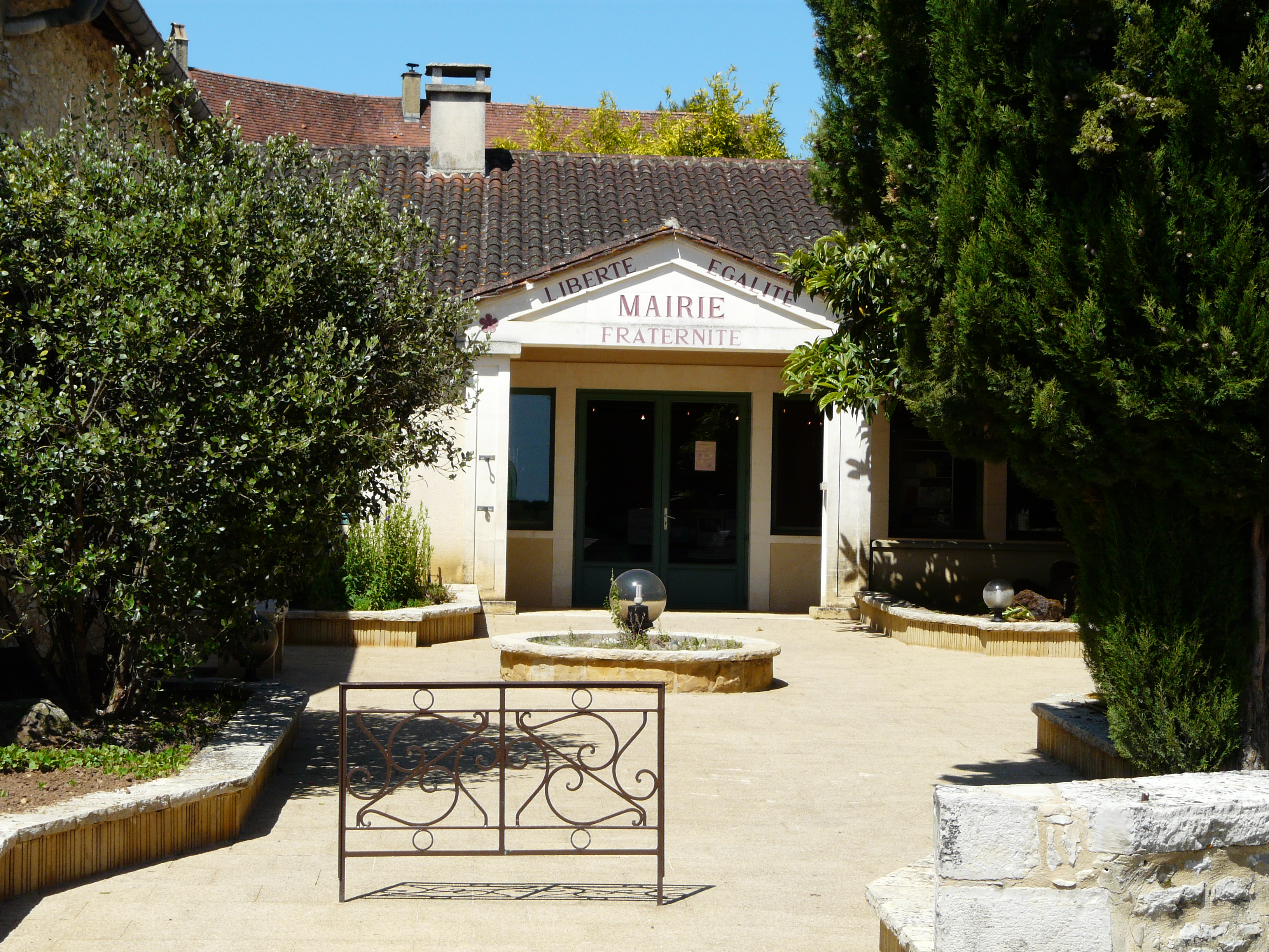 La mairie de Saint-Martial-de-Nabirat, Dordogne, France.